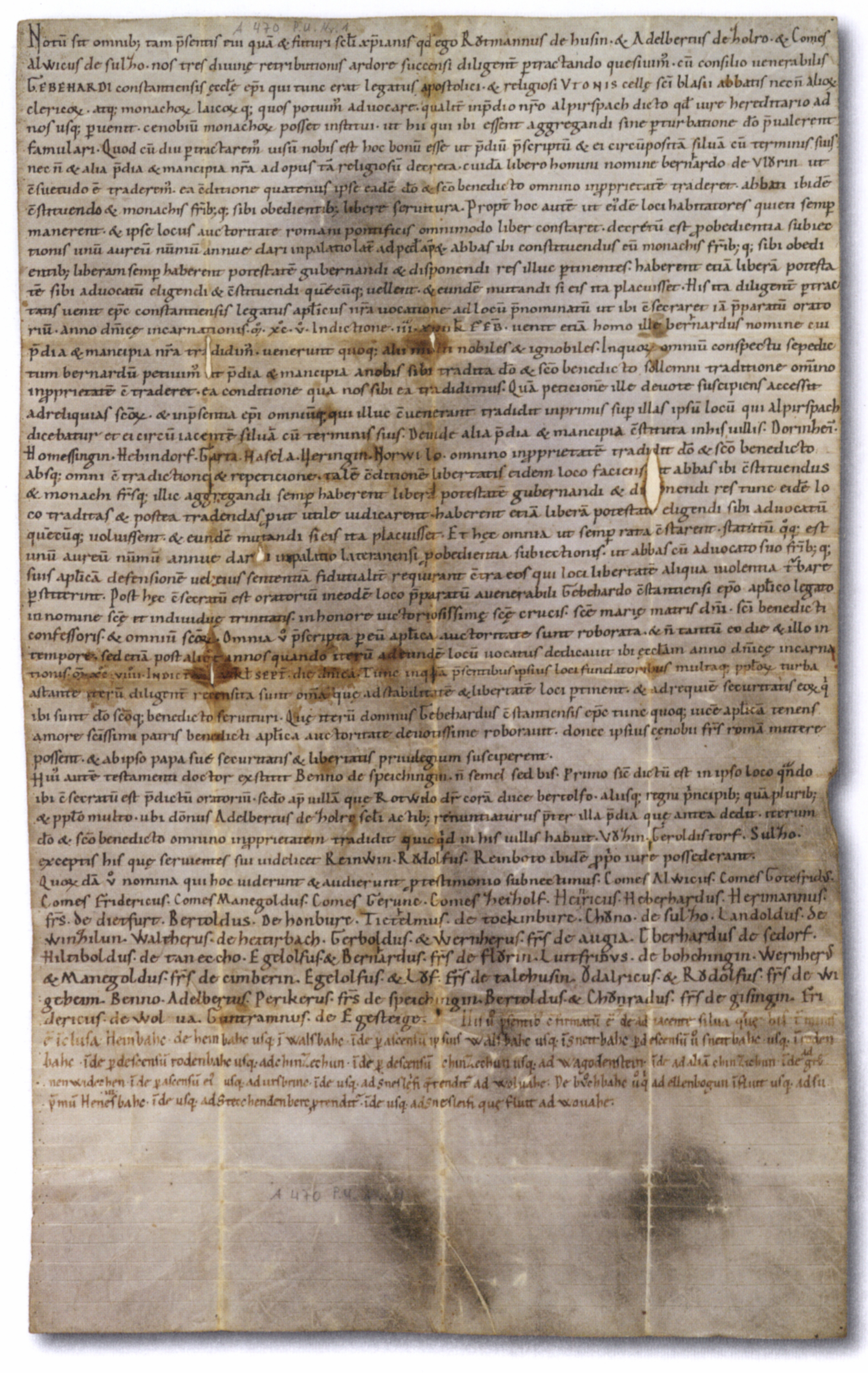 Gründungsbericht des Klosters Alpirsbach um 1099, HStAS A 470 U 1; (enthält die früheste Nennung der Herren von Zimmern)